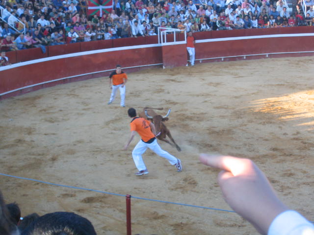 Zezenketa betizu batekin